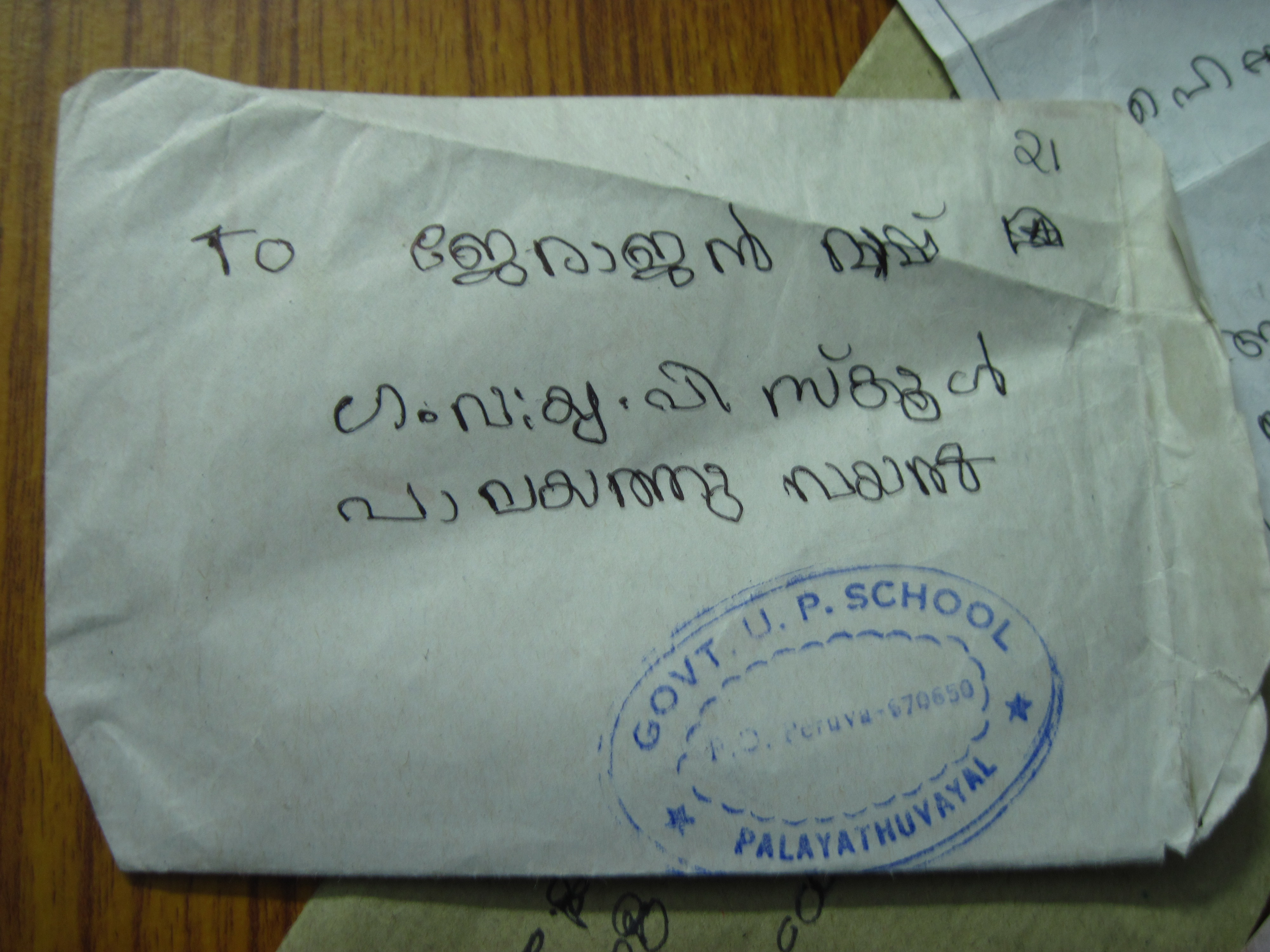 പാലയത്തുവയൽ ഗവണ്മെന്റ് യു.പി സ്കൂളിലെ കുട്ടികൾ അവരുടെ തപാൽ മാർഗം അദ്ധ്യാപകർക്ക് അയച്ച കത്തുകൾ